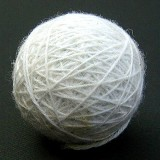 Pelote : noyau entouré de fil de laine